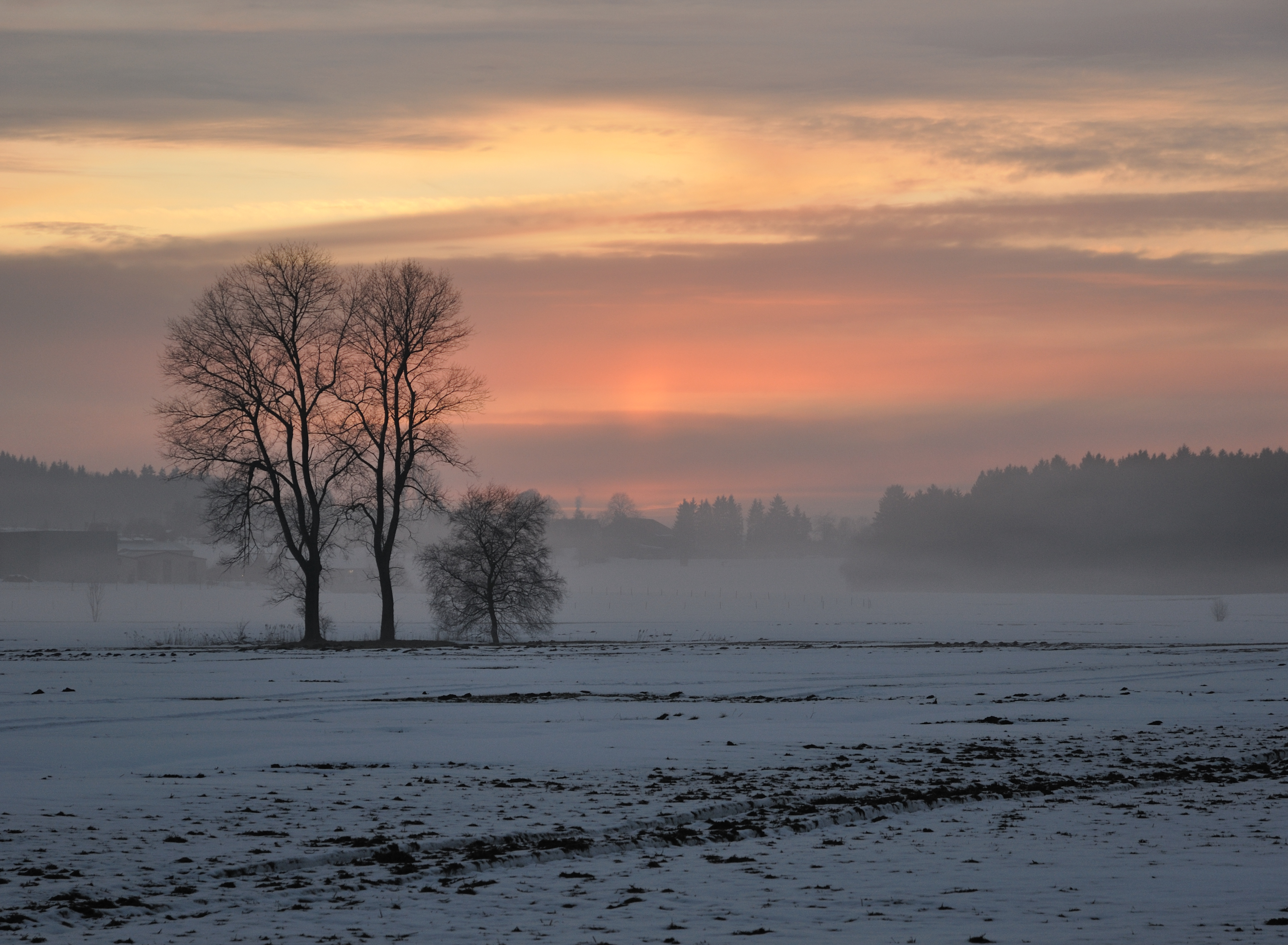 Sonnenuntergang am Ruschweiler See, Ilmensee-Ruschweiler